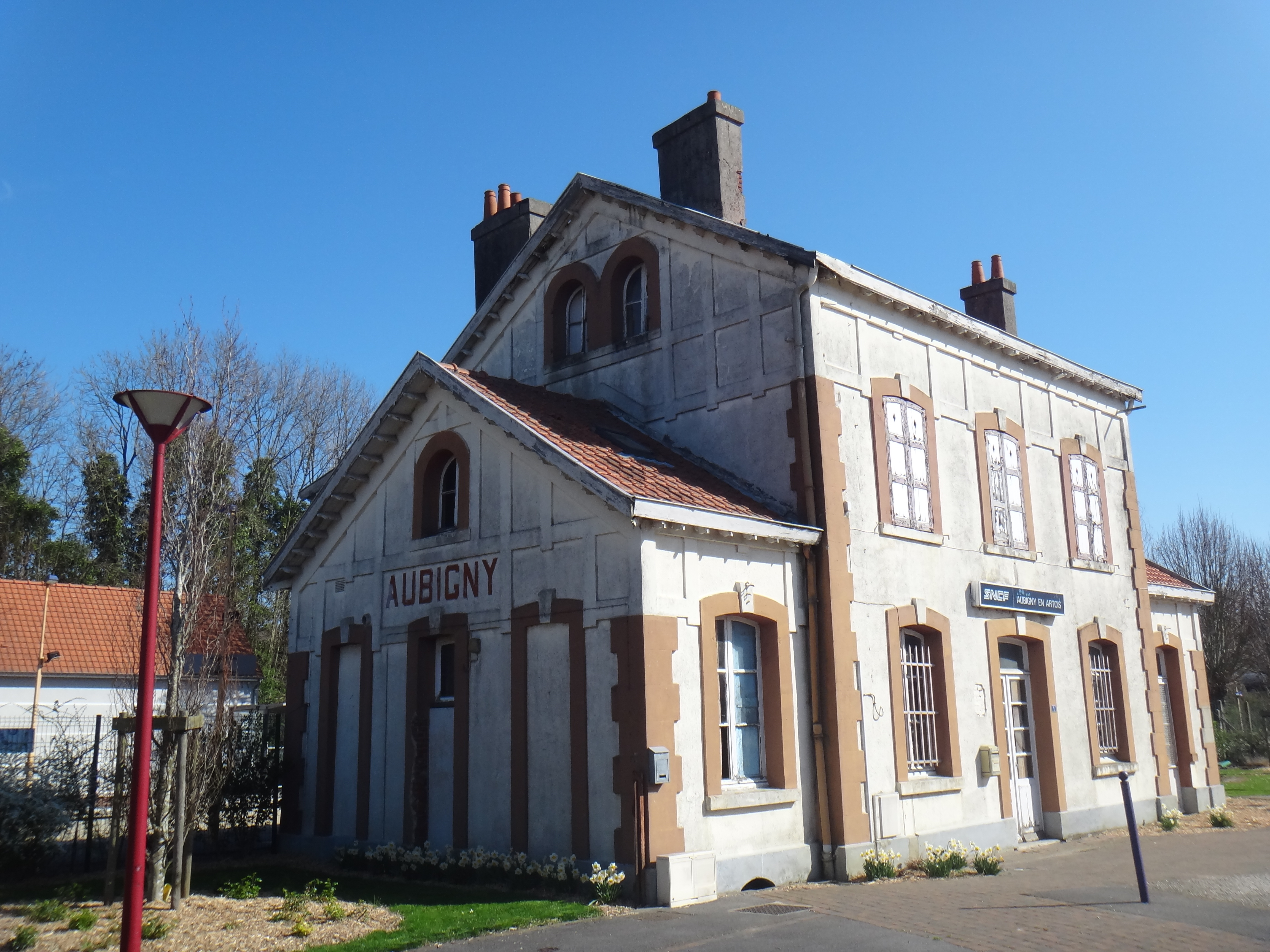 Gare d'Aubigny-en-Artois, Pas-de-Calais, France, en 2014